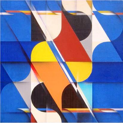 Opera pittorica del Maestro Romano Rizzato dal titolo "Linee ascendenti IV", tecnica acrilico su tela, dimensioni cm. 60x60, anno di realizzazione 2005.